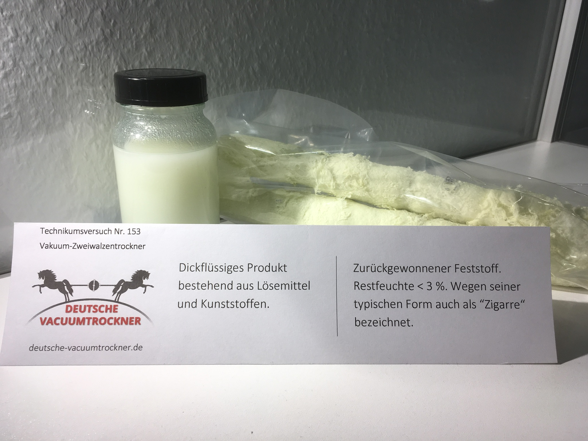 Technikumsversuch Nr. 153. Ausgangsprodukt und abgetrennter Feststoff.